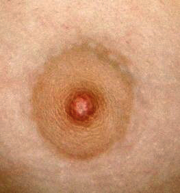 weibliche